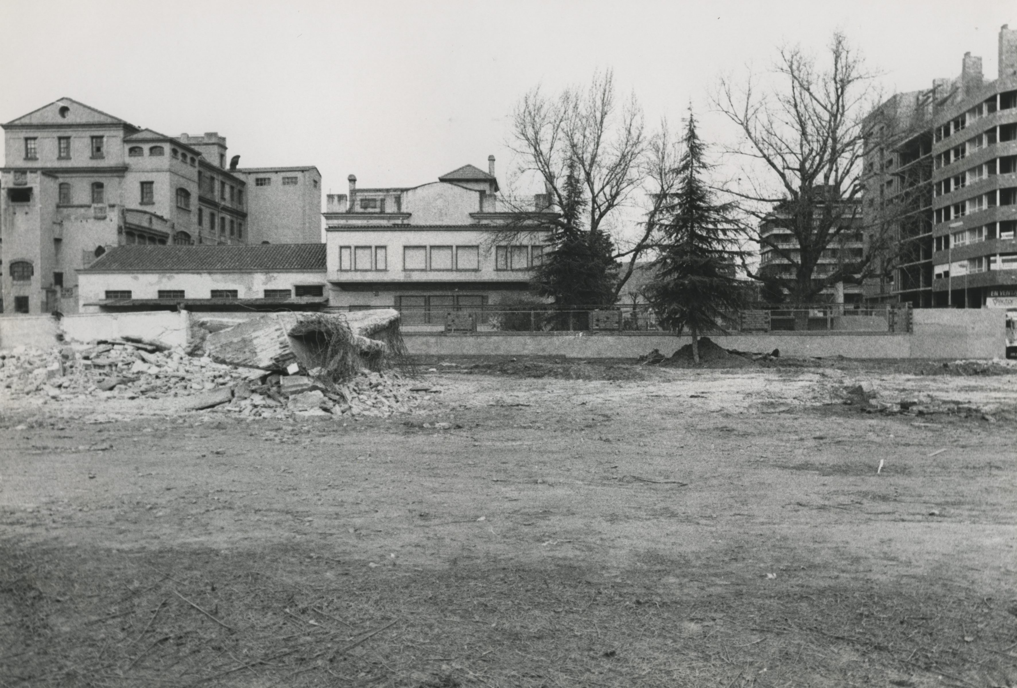 Obres d'urbanització del carrer Emili Grahit a l'altura de la Farinera Ensesa.